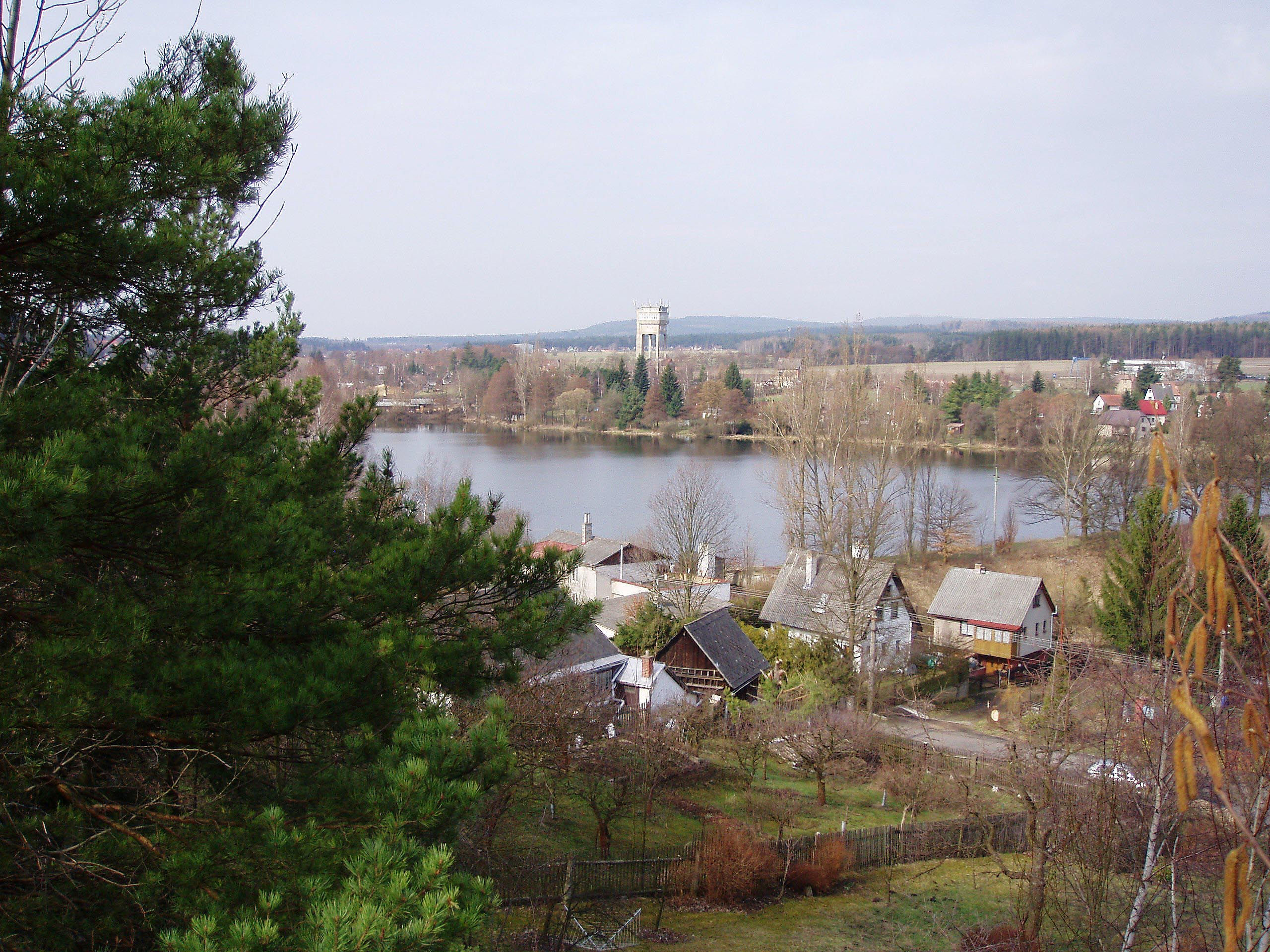 Vysoká Pec - Vysokopecký rybník s těžní věží v pozadí